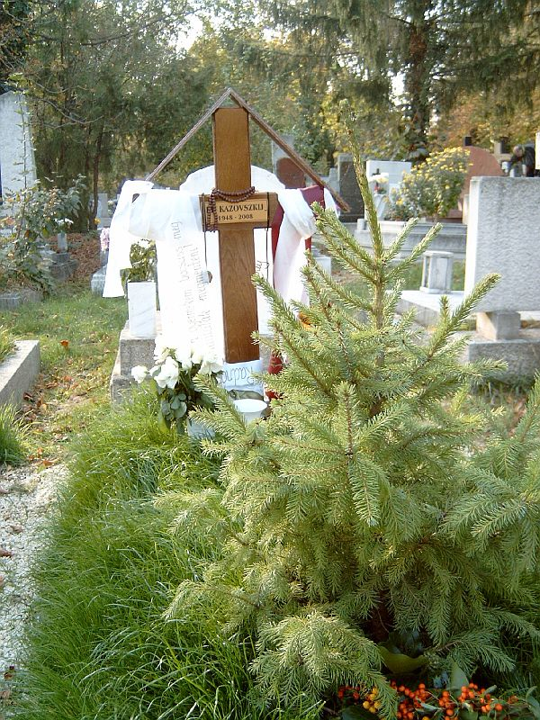 El Kazovszkij (Elena Kazovszkaja) sírja Budapesten. Farkasréti temető: 5-1-413.